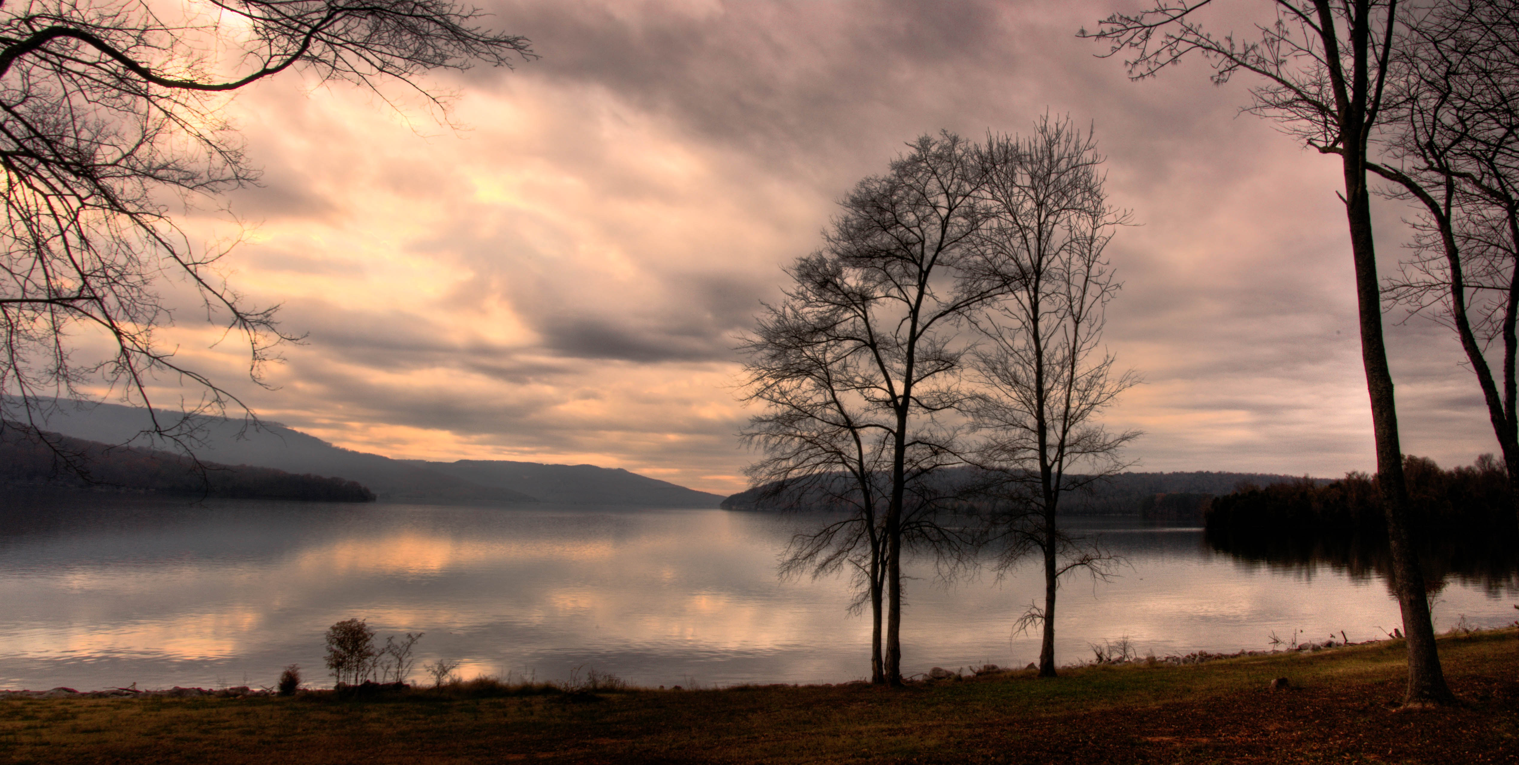 Tennessee, USA